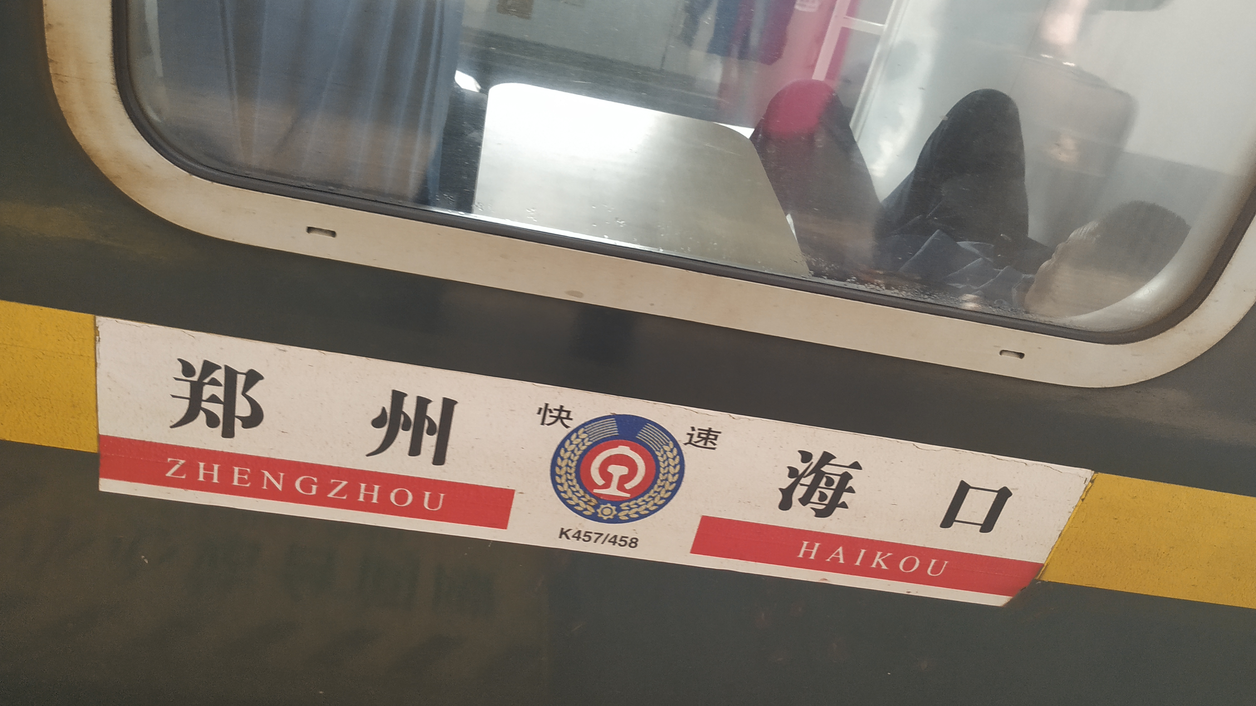 中文（中国大陆）: 海口到郑州的K458